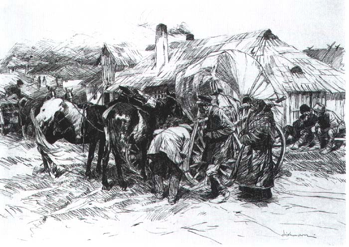 Przed karczmą na Wileńszczyźnie